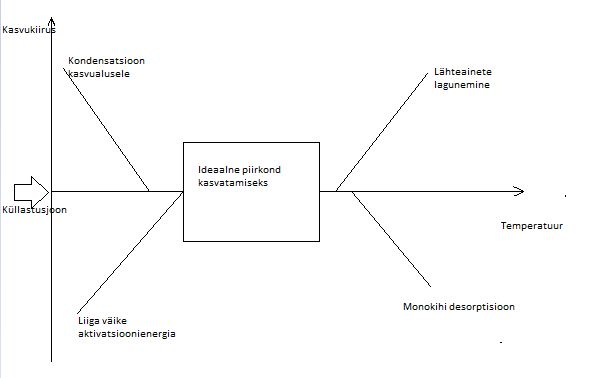 Kile kasvukiiruse sõltuvus temperatuurist